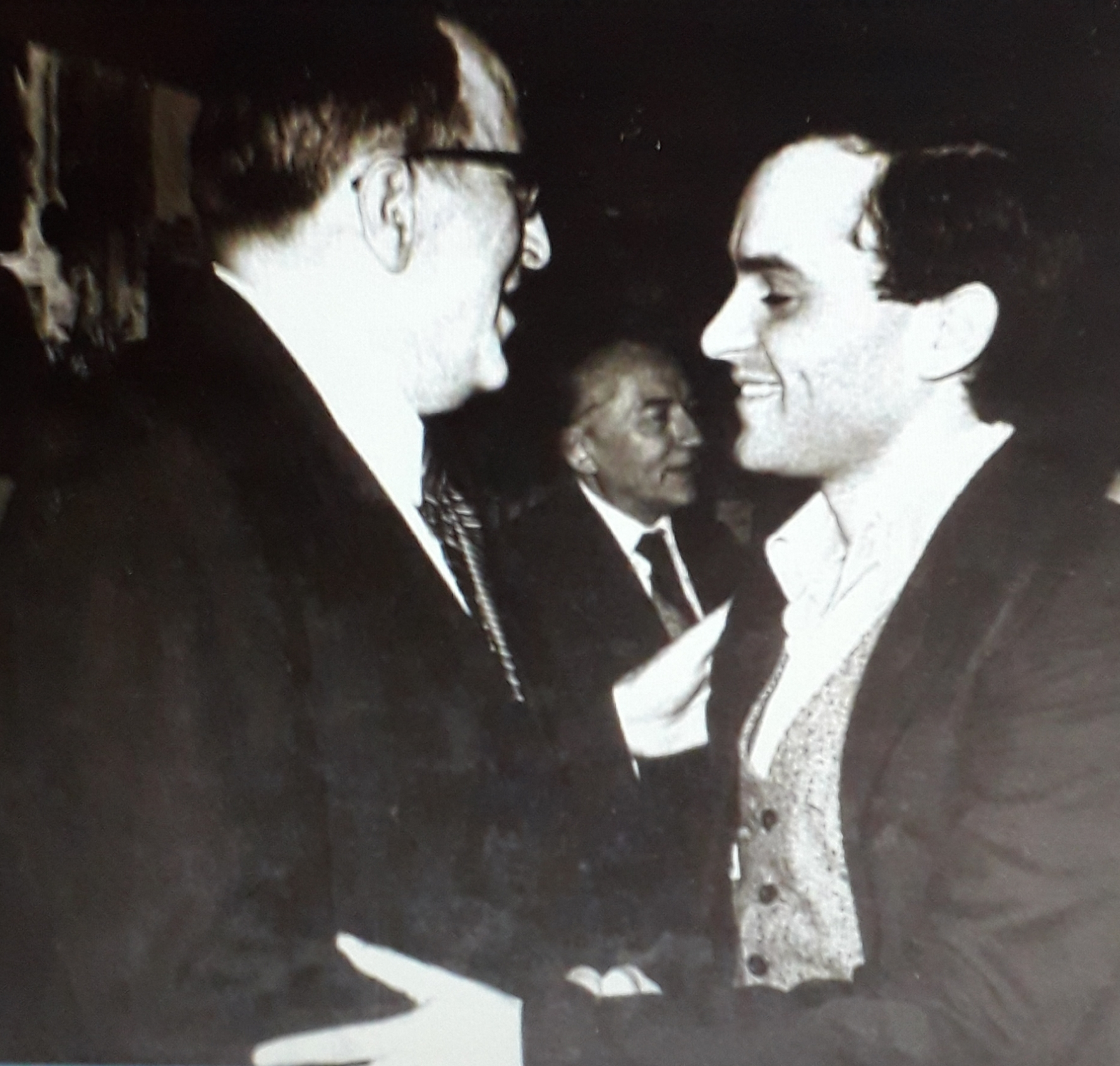 Ђорђе Ђнеић у друштву са Радивојем Марковићем у Радио Београду, 1979. године. Аутор:Драган Бибић (по одобрењу)